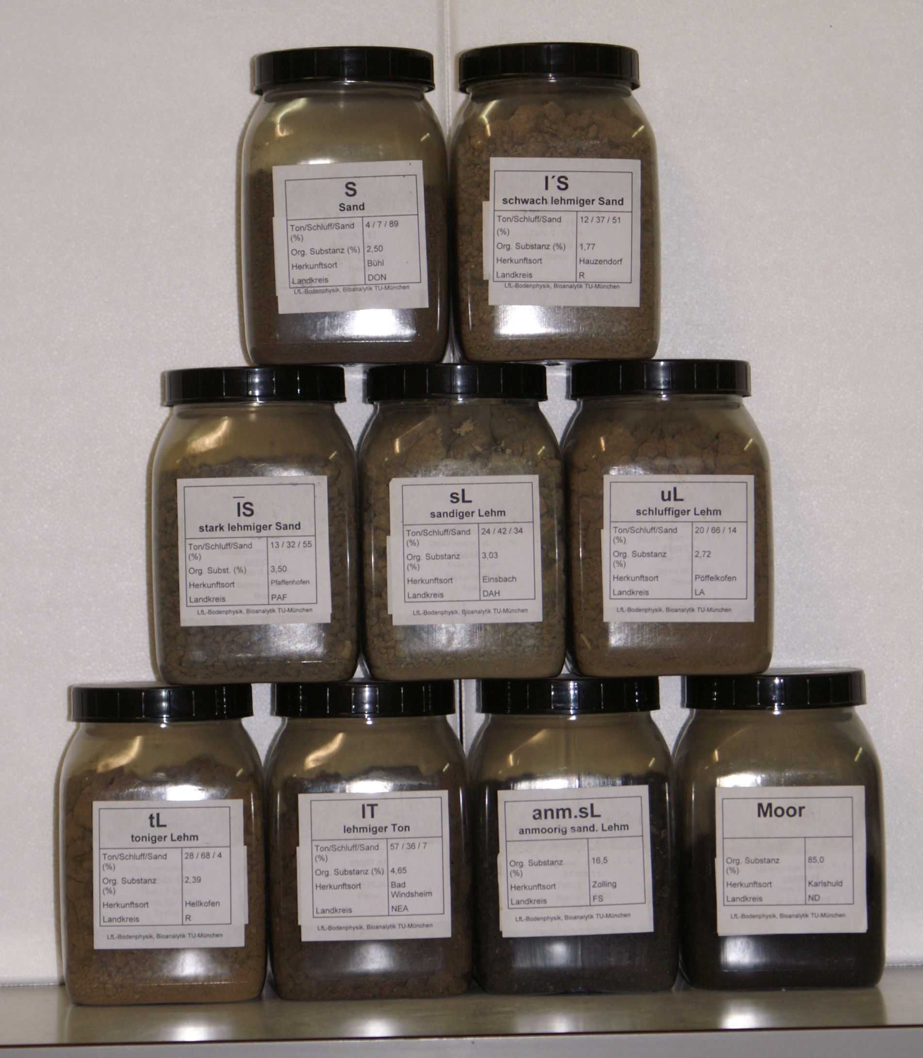 Für die Bestimmung der Bodenart mit der Fingerprobe sind Standardböden mit bekannter Körnung sehr wertvoll